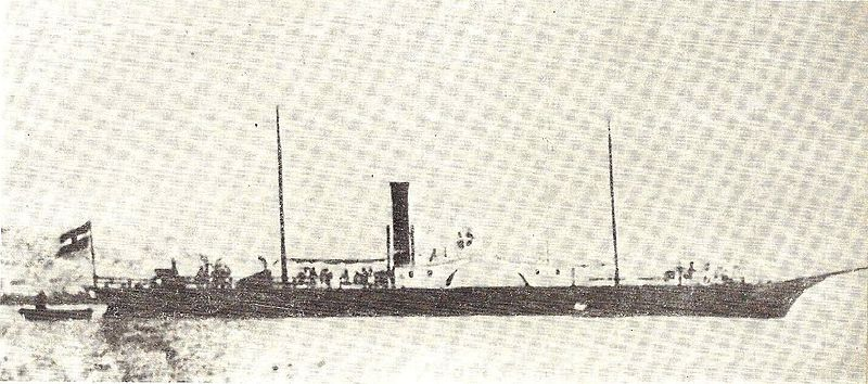 SMS Franz Joseph der österreichischen Gardaseeflotille ca. 1860